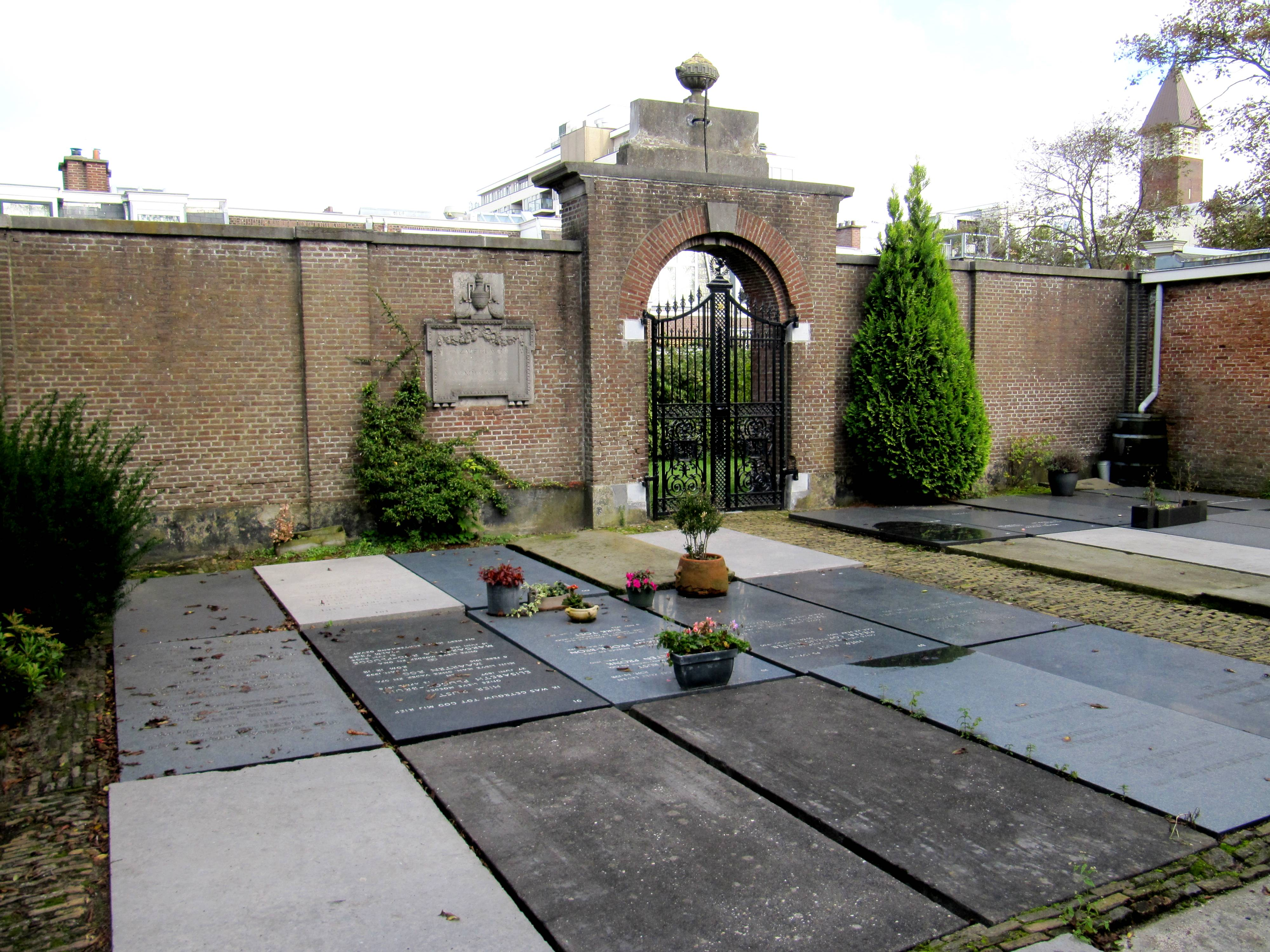 Den Haag Begraafplaats Ter Navolging - gesticht in 1779